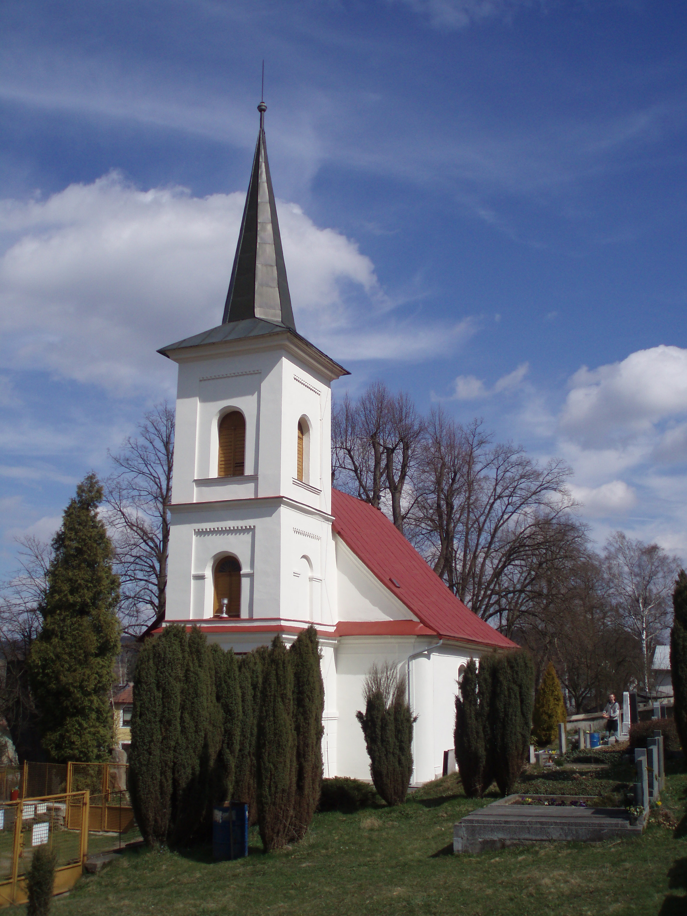 Protestant church in Sázava near Žďár nad Sázavou, Vysočina region, Czech republic